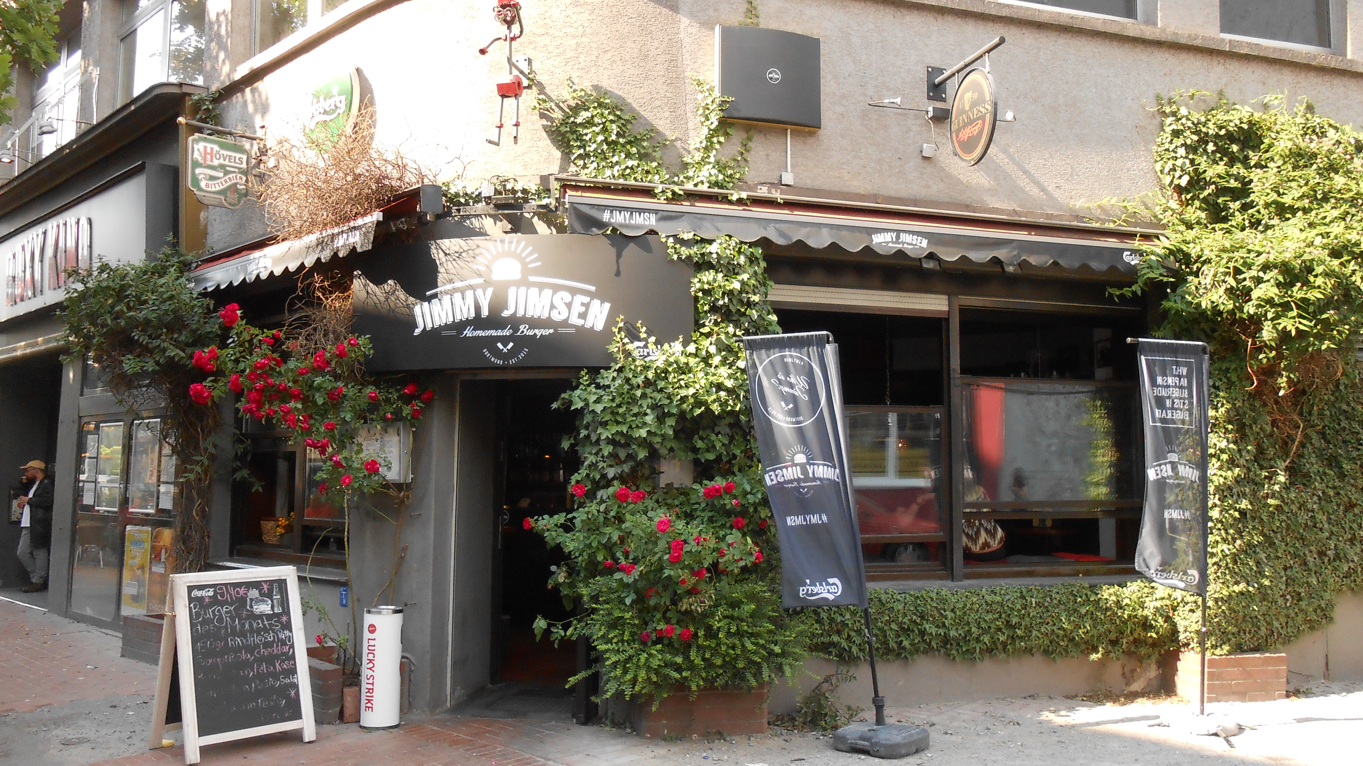 Der Jimmy Jimsen Hamburgerladen am Ende der Fußgängerzone Münsterstraße, neben dem Roxy-Kino. Früher war hier die bekannte Jazzkneipe Bass ansässig.